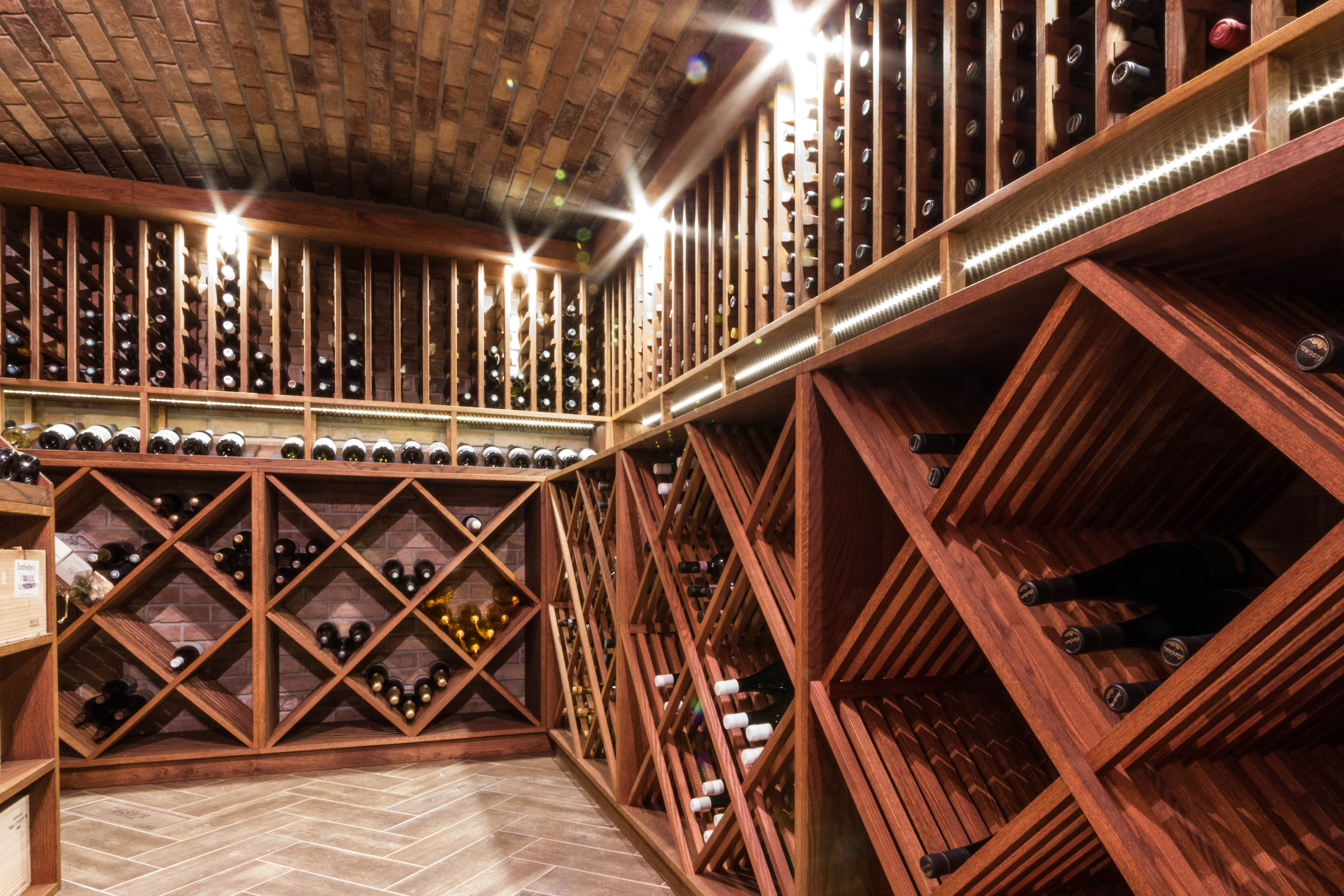 Aktivní vinný sklep dokáže pojmout až 2000 lahví, sklep je aktivně chlazen speciální klimatizací Wine Guardian